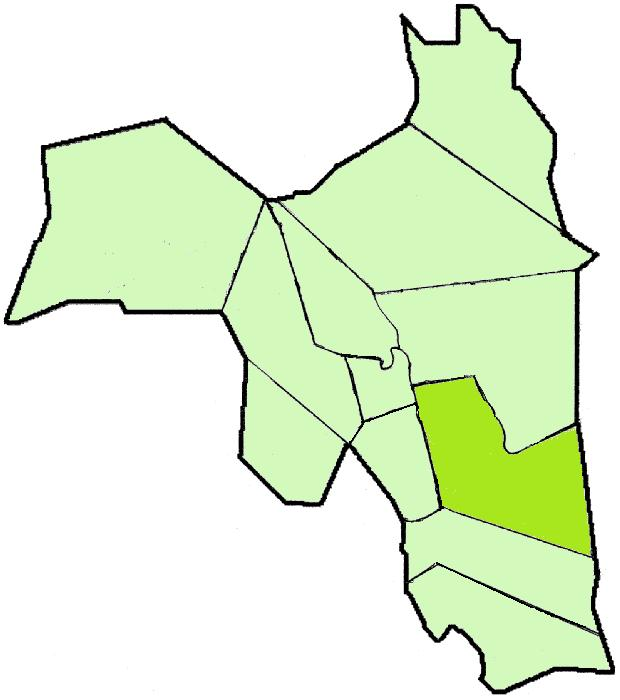 Lapinjärven kartta: Heikinkylän sijainti